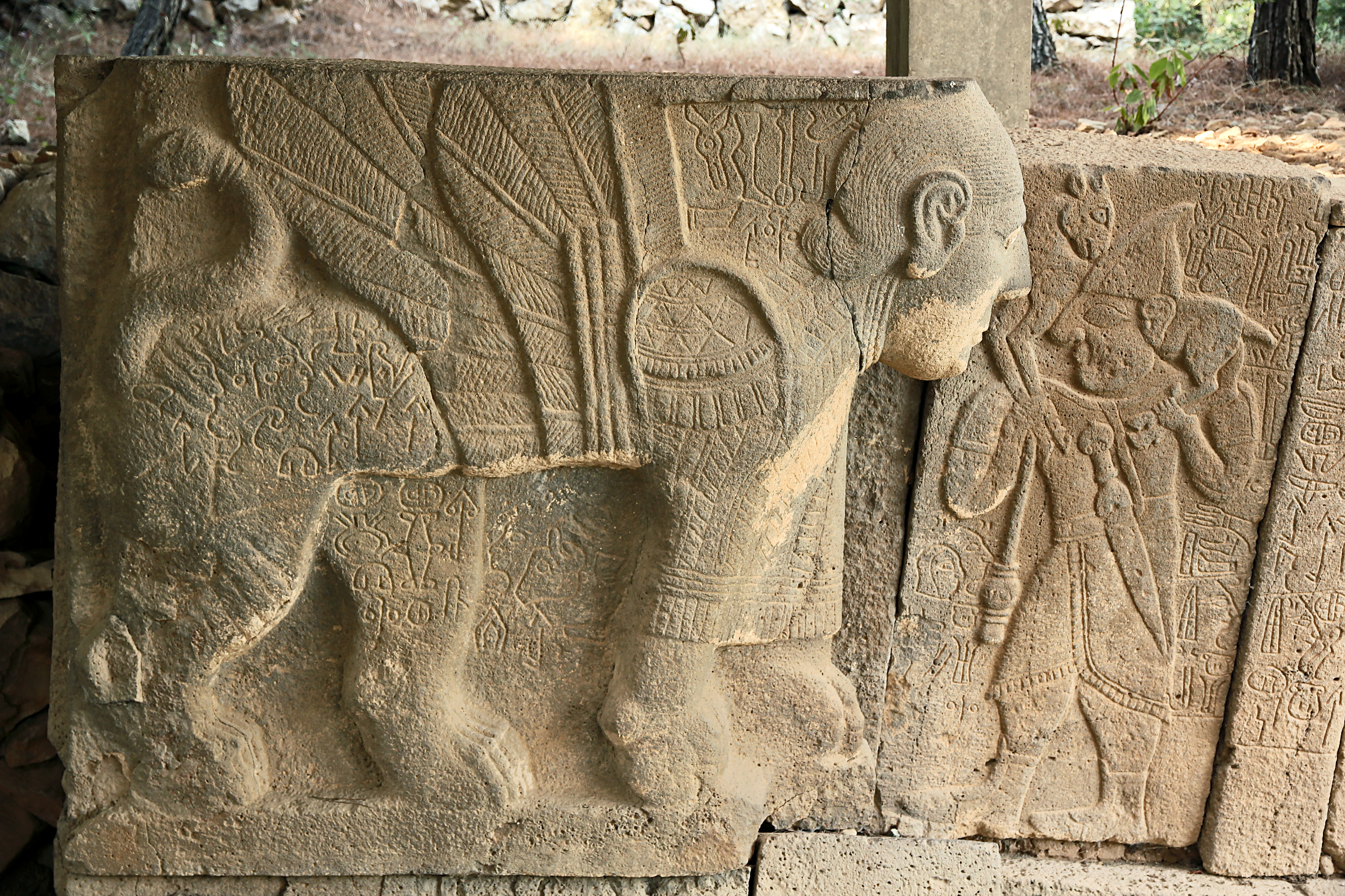 Karatepe (Asatiwataya), neo-hethitischer Fundort bei Osmaniye, Südtürkei, Nordtor, Reliefs 13-11